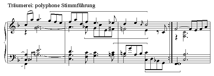 Polyphone Stimmführung in Robert Schumanns Träumerei. In Anlehnung an Alban Bergs Analyse